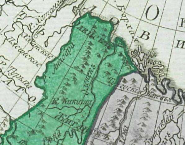 Фрагмент с изображением города Оленска карты Атласа Российской империи 1792 года